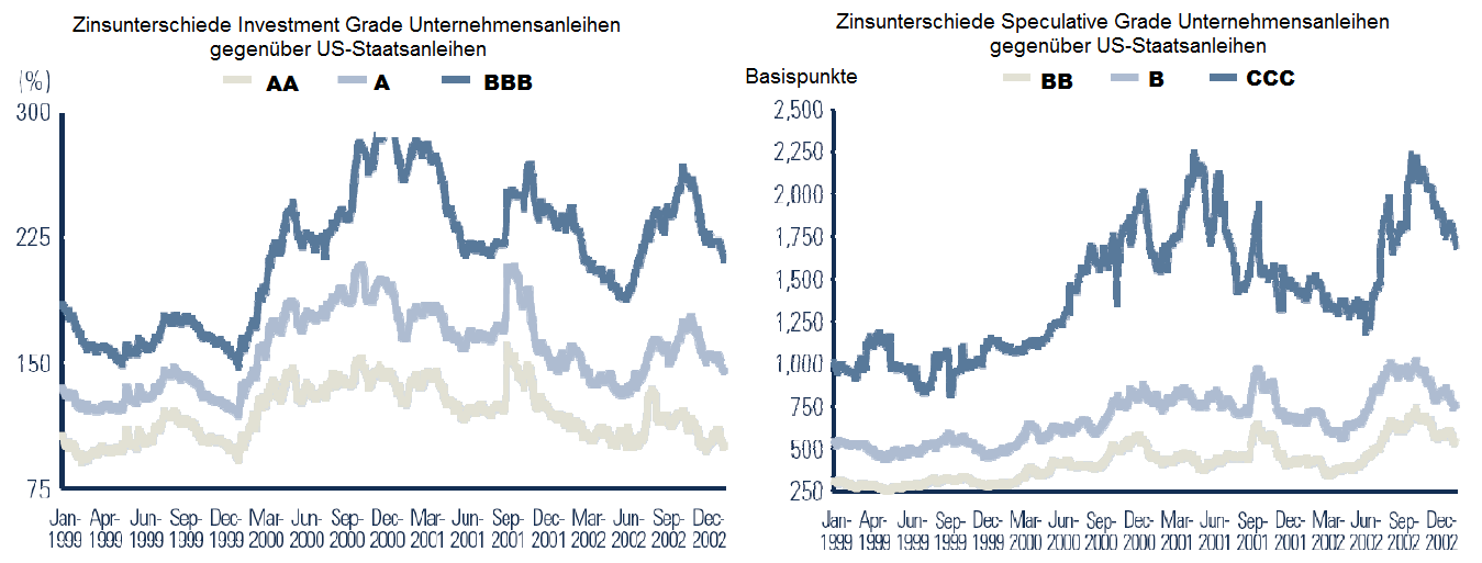 Zinsunterschiede.png